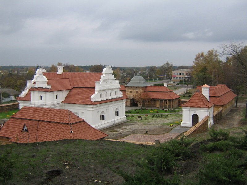 Резbденція Богдана Хмельницького в Чигирині